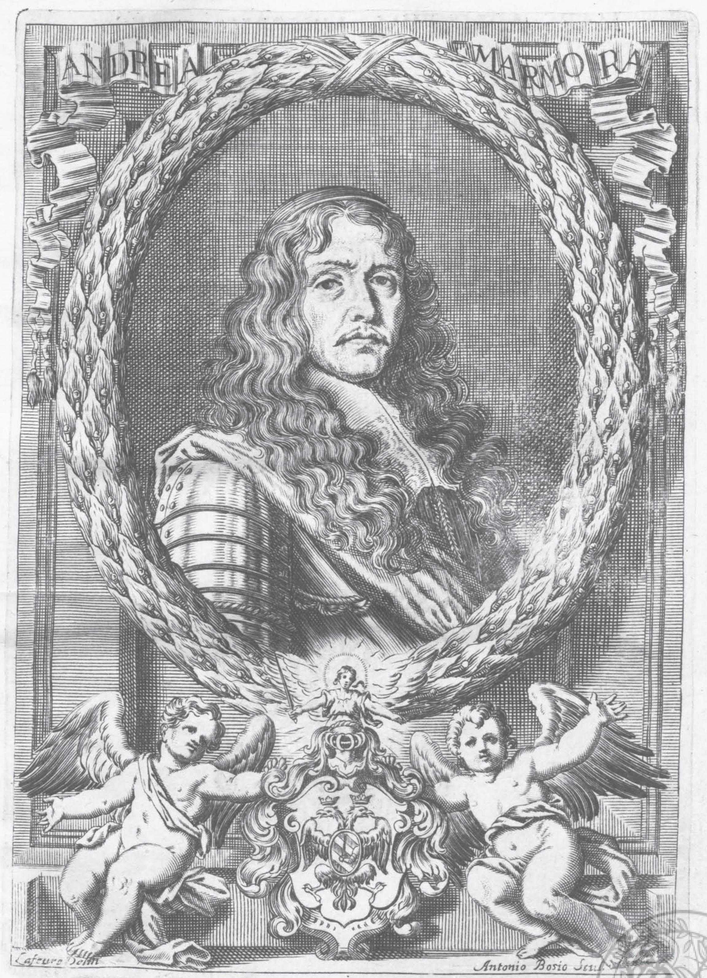 Ανδρέας Μαρμοράς, Griechischer Gelehrter, 17. Jahrhundert